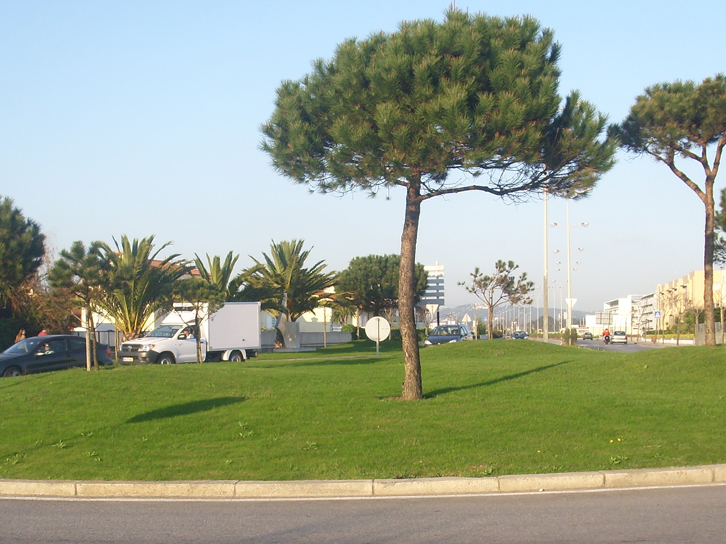 Monte de São Félix, tal como é visto da Cidade, pela Avenida do Mar.